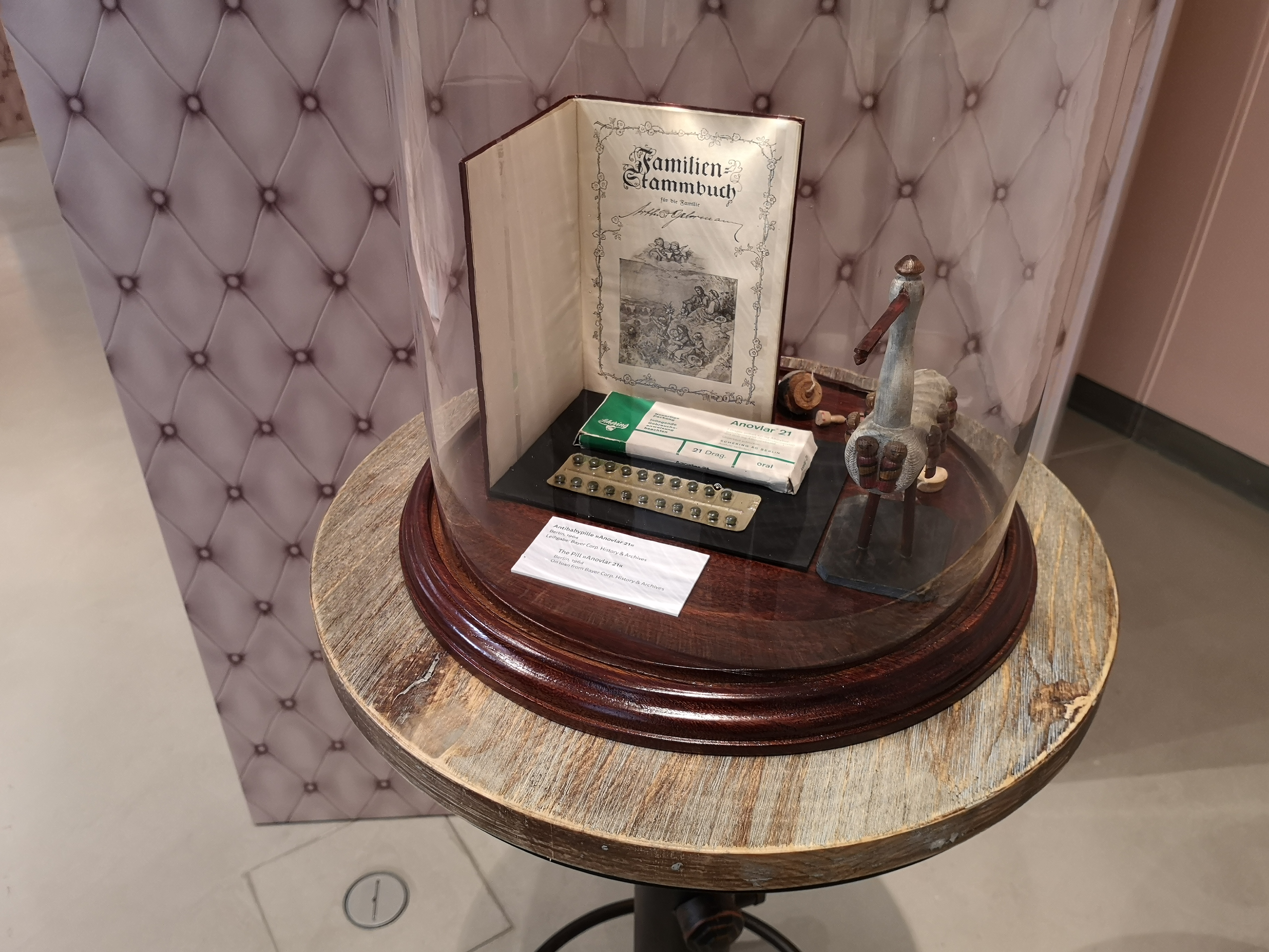 Die erste Antibabypille im Museum Europäischer Kulturen in der Ausstellung Hochzeit 2018